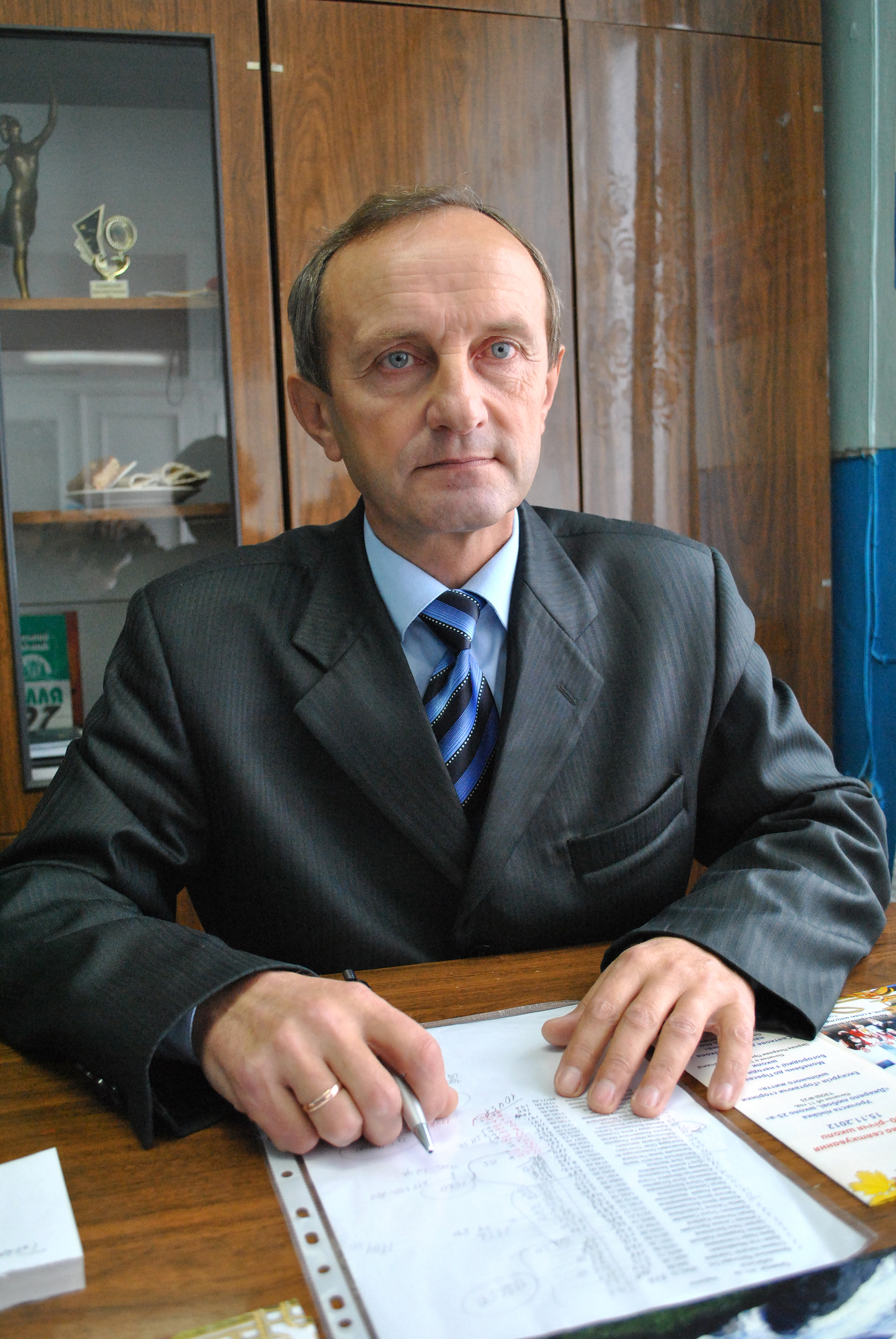 Директор Тернопільської загальноосвітньої школи № 25 Ігор Михайлович Дудас.